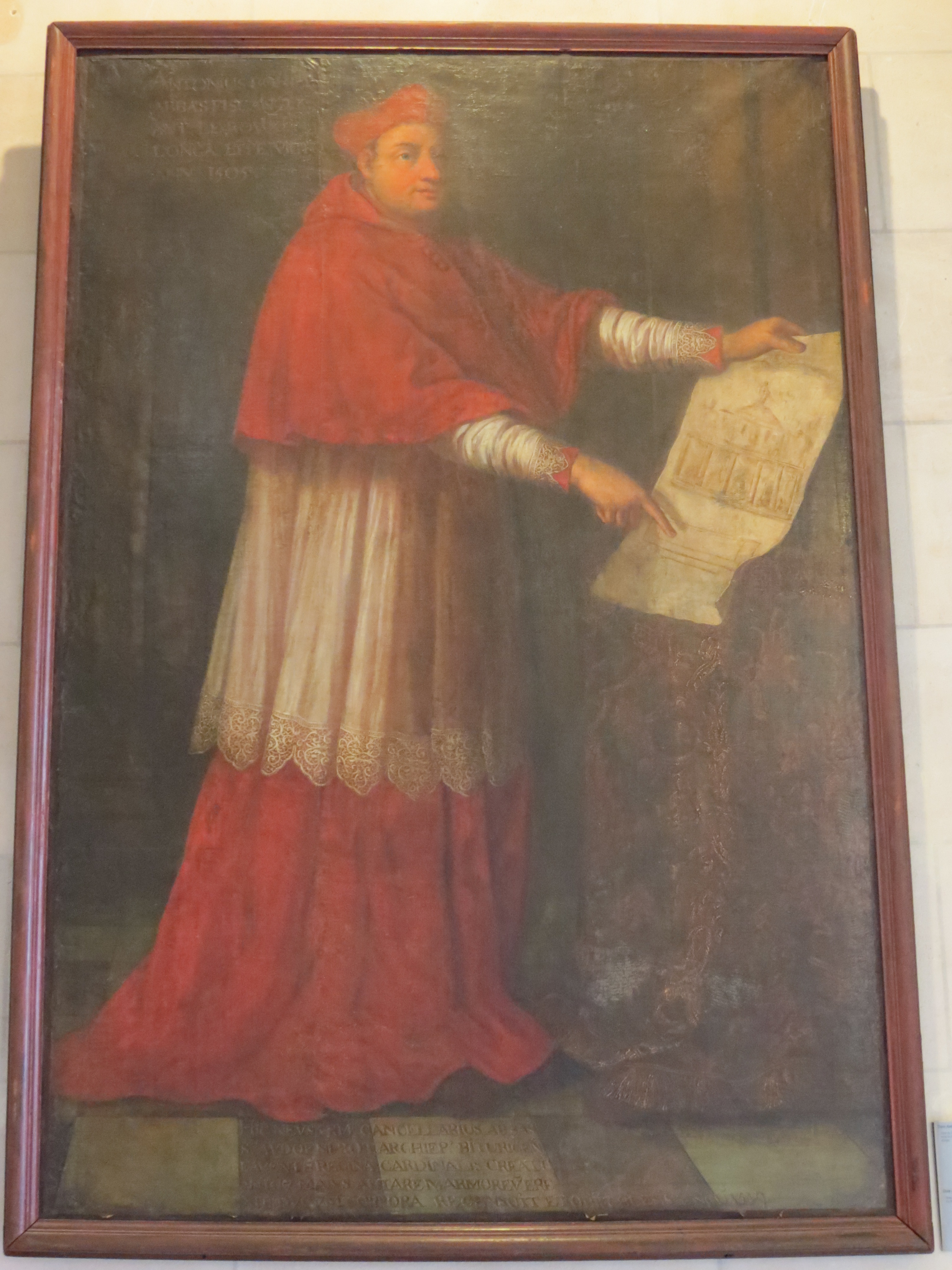 Tableau d'Antoine Bohier, abbé de Fécamp (1505-1519).